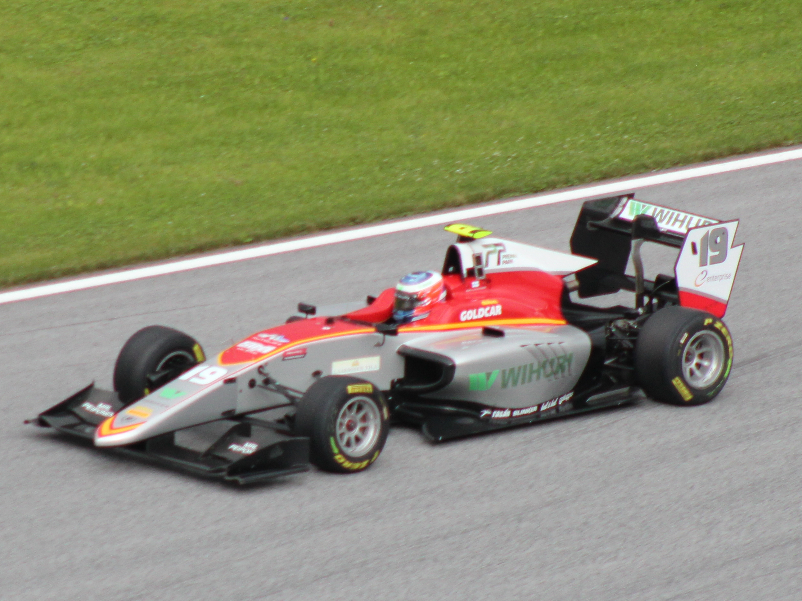 19 Simo Laaksonen beim Rennwochenende in Österreich 2018